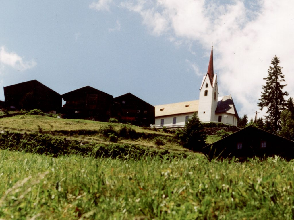 St. Veit in Defereggen Aufstieg vom Tal